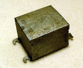 Blockkondensator aus dem Jahre 1923